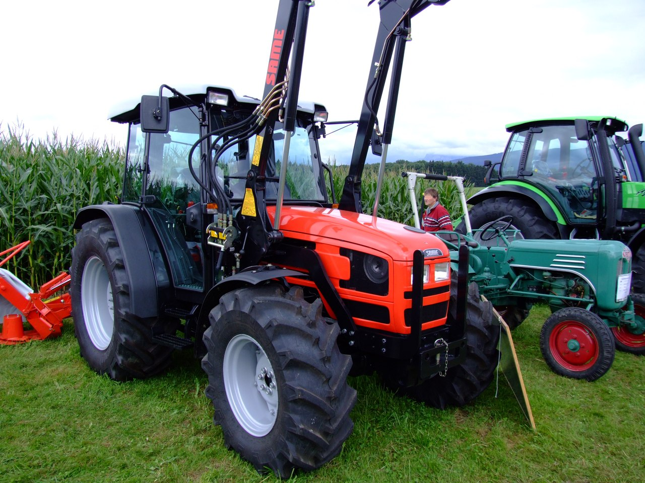 SAME-Traktor Dorado 86 mit SAME-Frontlader